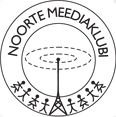 Noorte Meediaklubi logo